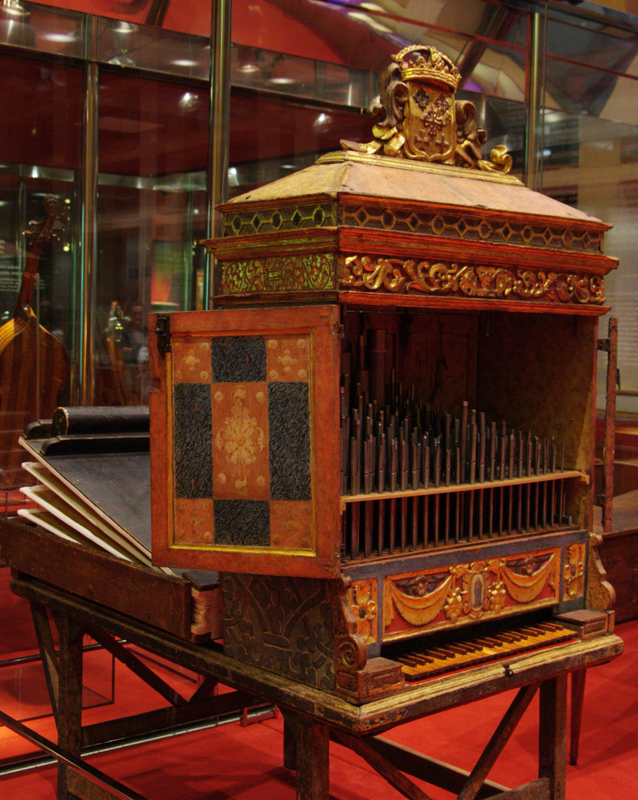 Instruments al Museu de la Música de Barcelona. Fotografies fetes durant el Backstage pass, el 21-11-2013 MDMB 592: Orgue, 2nd half of 17c.